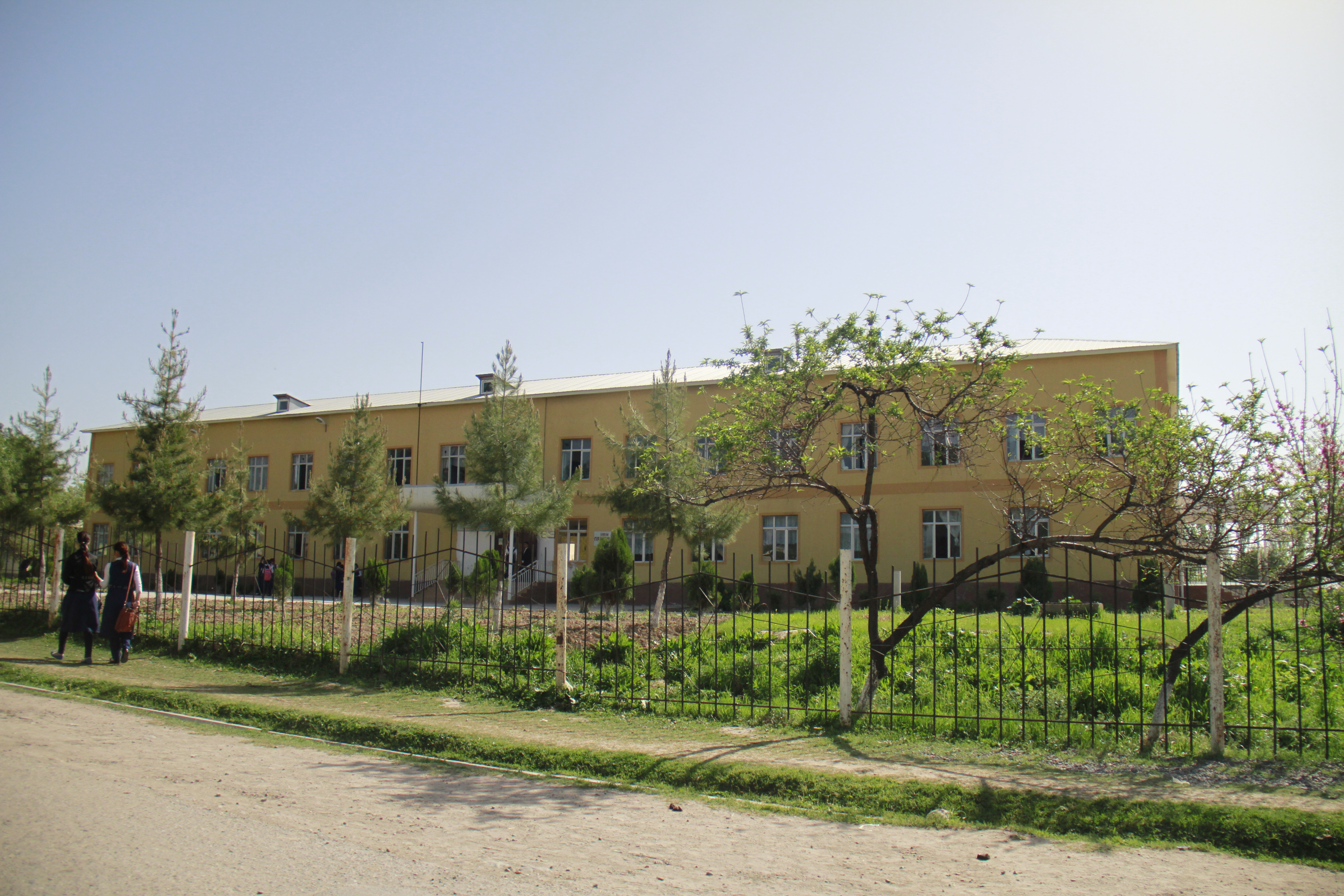 Тоҷикӣ: Ш. Ҳисор, д. Ғурёт (4)